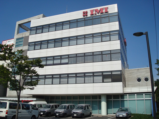 IMI 本社